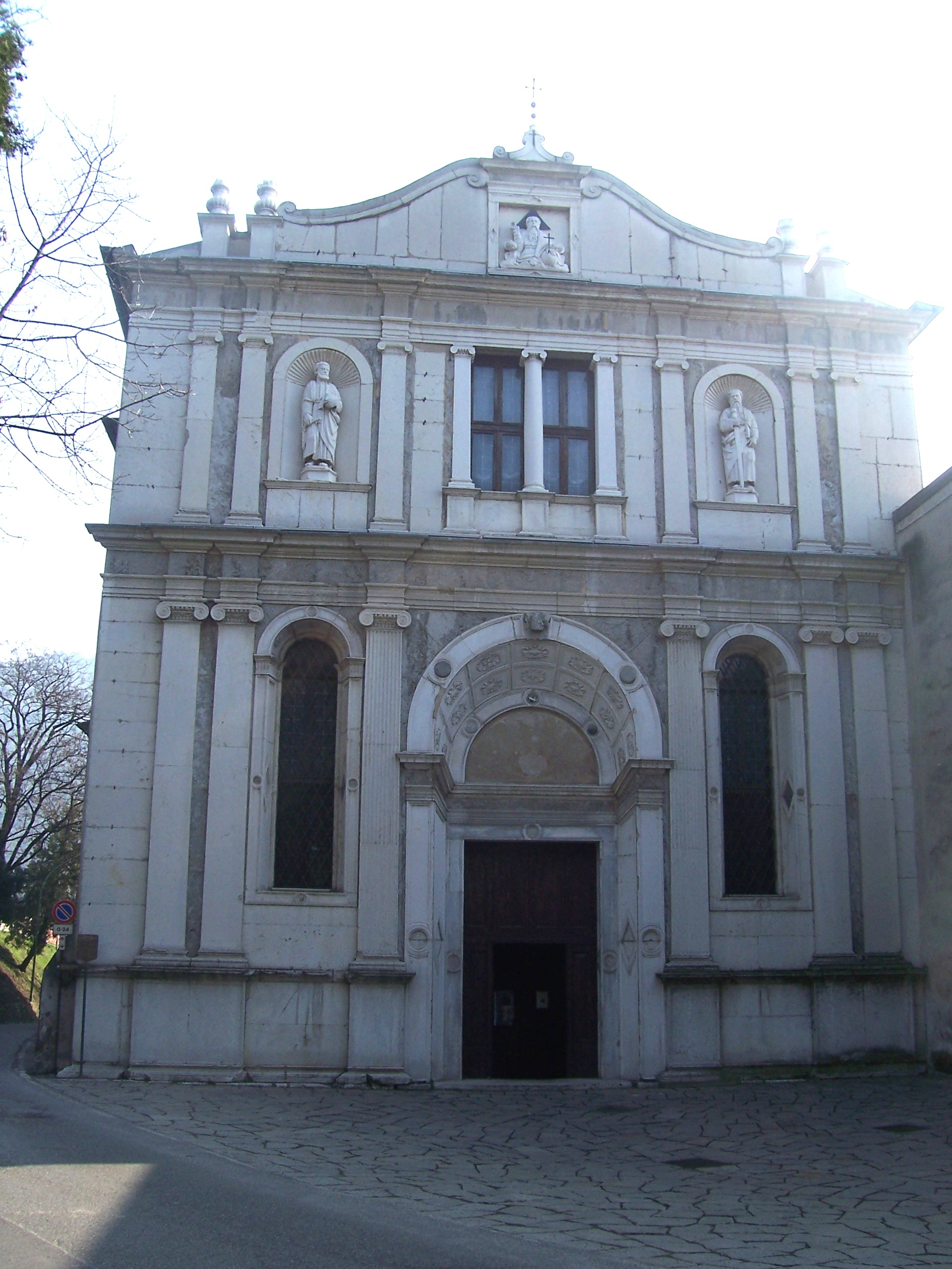 san pietro in oliveto facciata.jpg